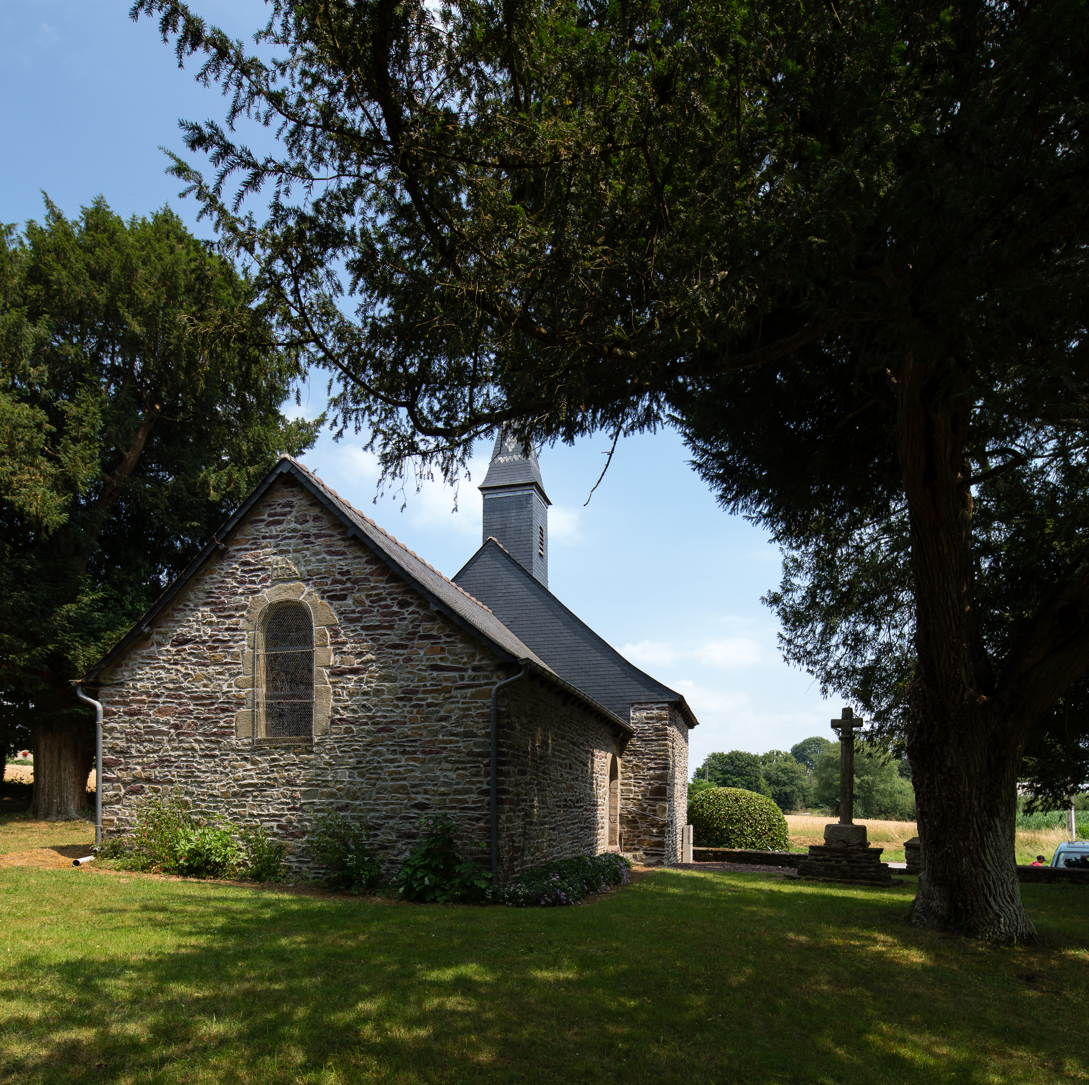 Chapelle Saint-Anne à Mauron (France).